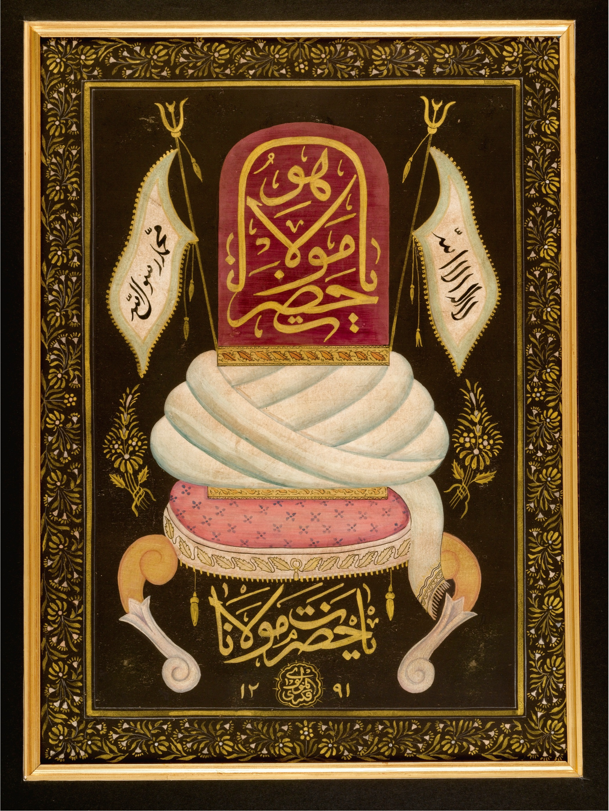 Mevlana'nın bir eseri